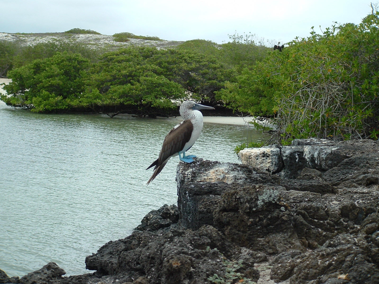 Piquero de Patas Azules de Galápagos